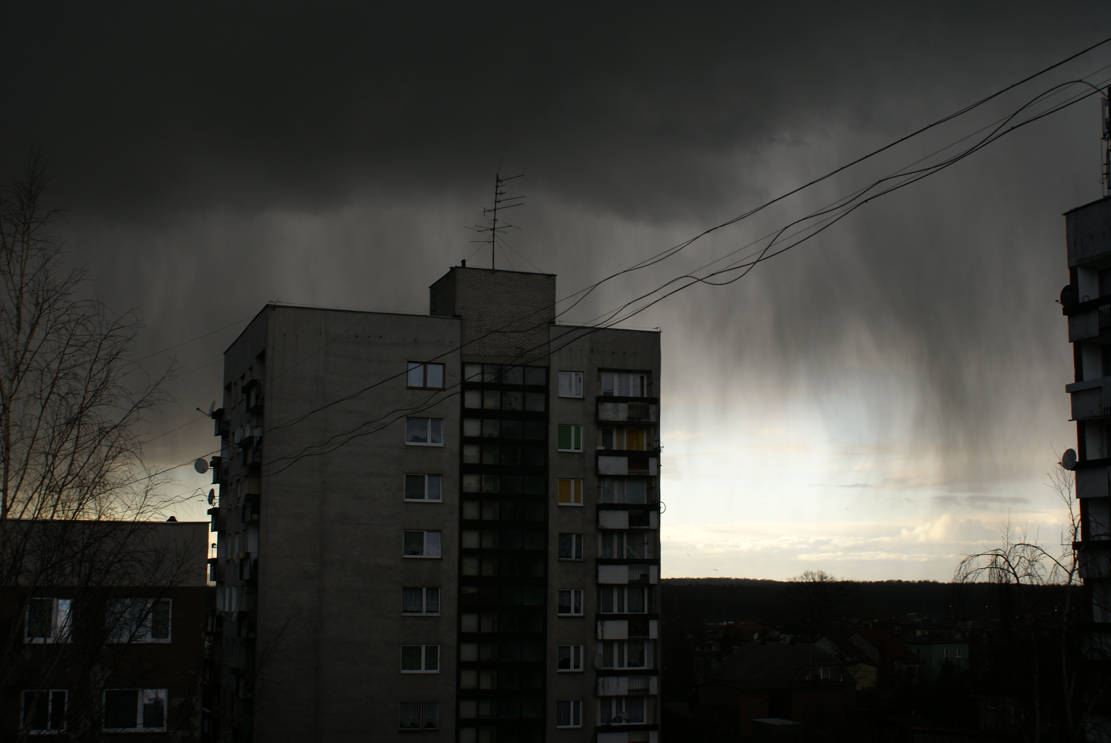 Blok na tle chmury burzowej.